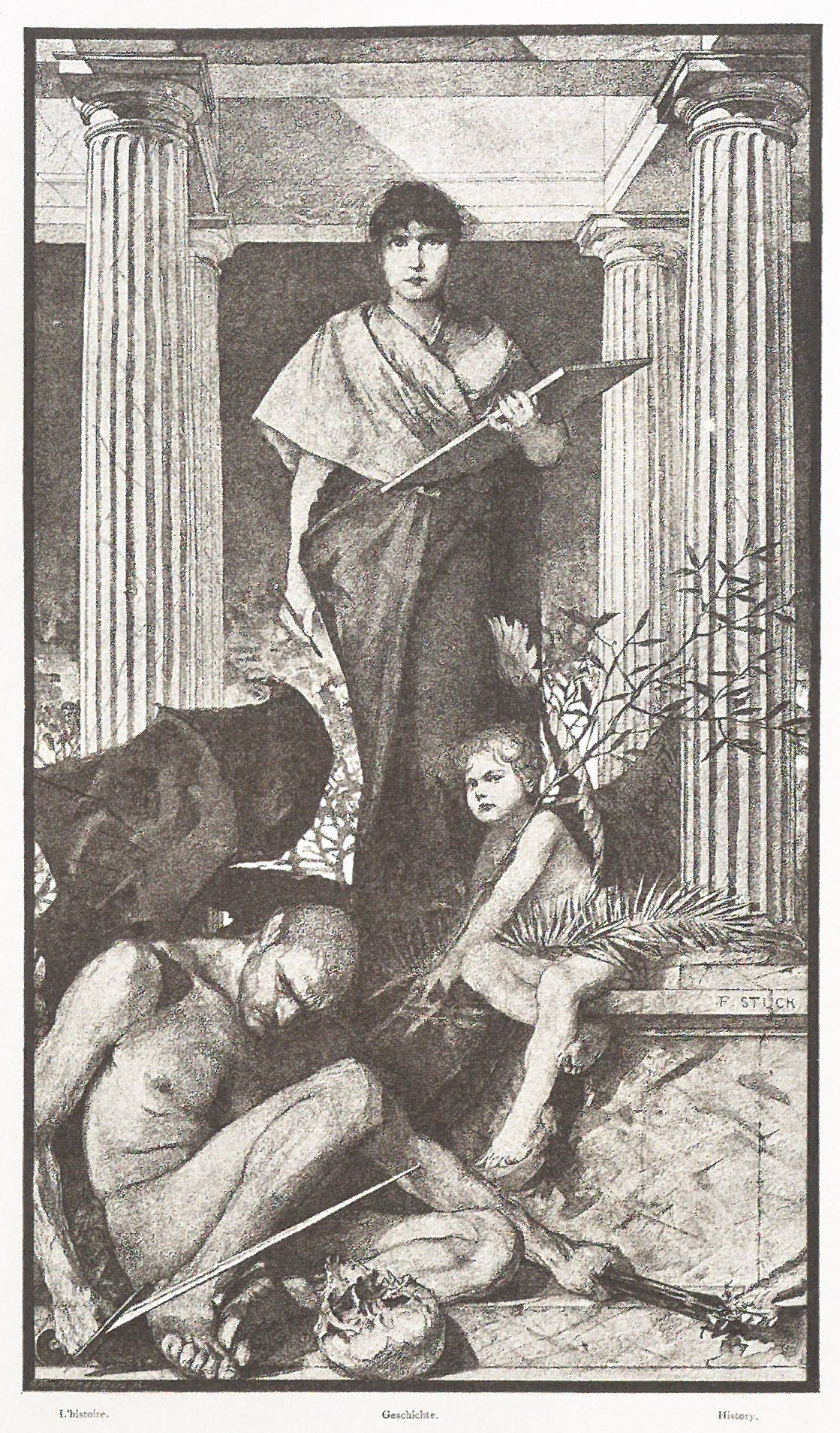 "Geschichte" (Druck aus: Allegorien und Embleme, Abtheilung I, Taf. 55a)